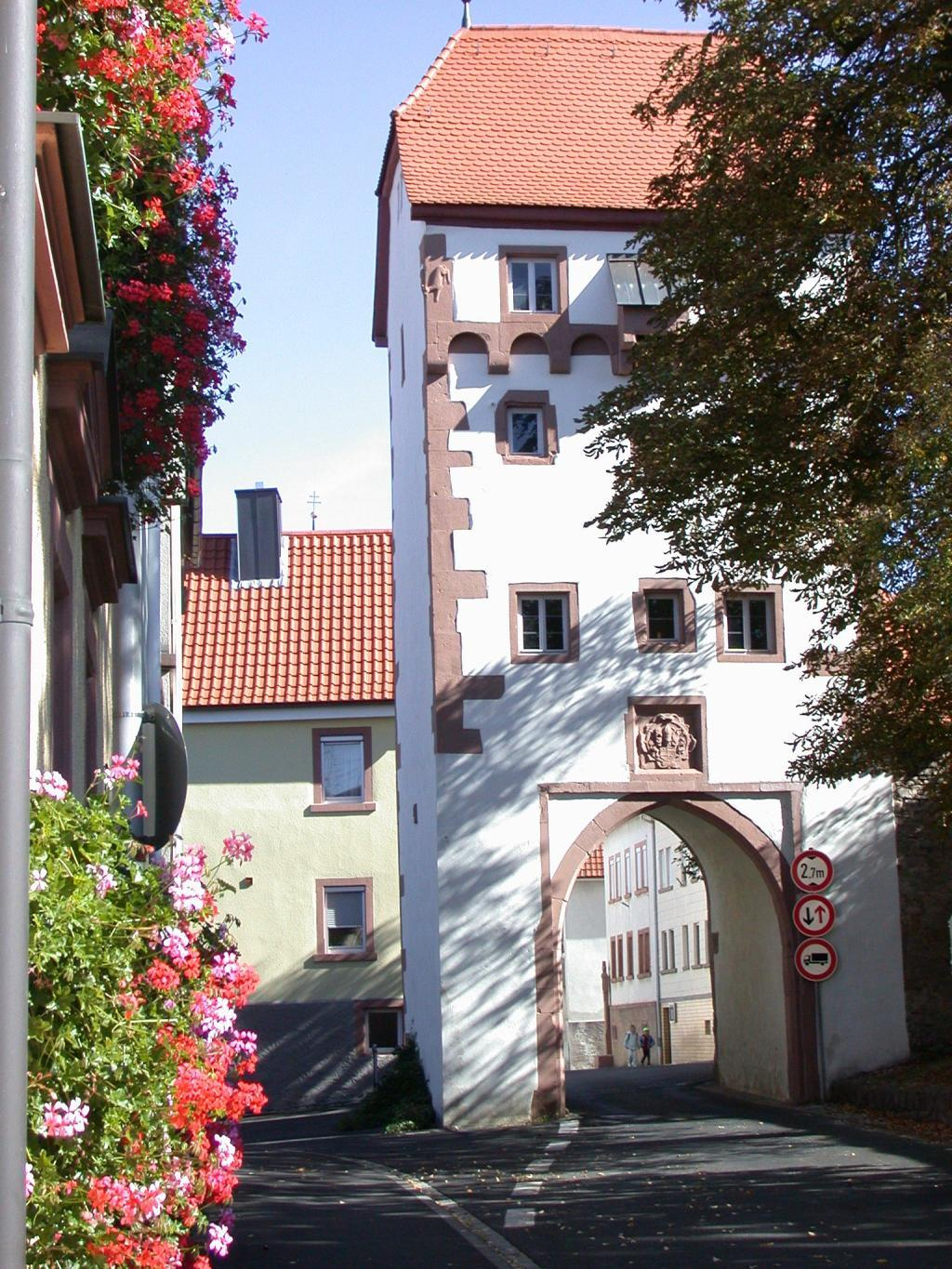 Aufnahme des Torhauses in Neubrunn.